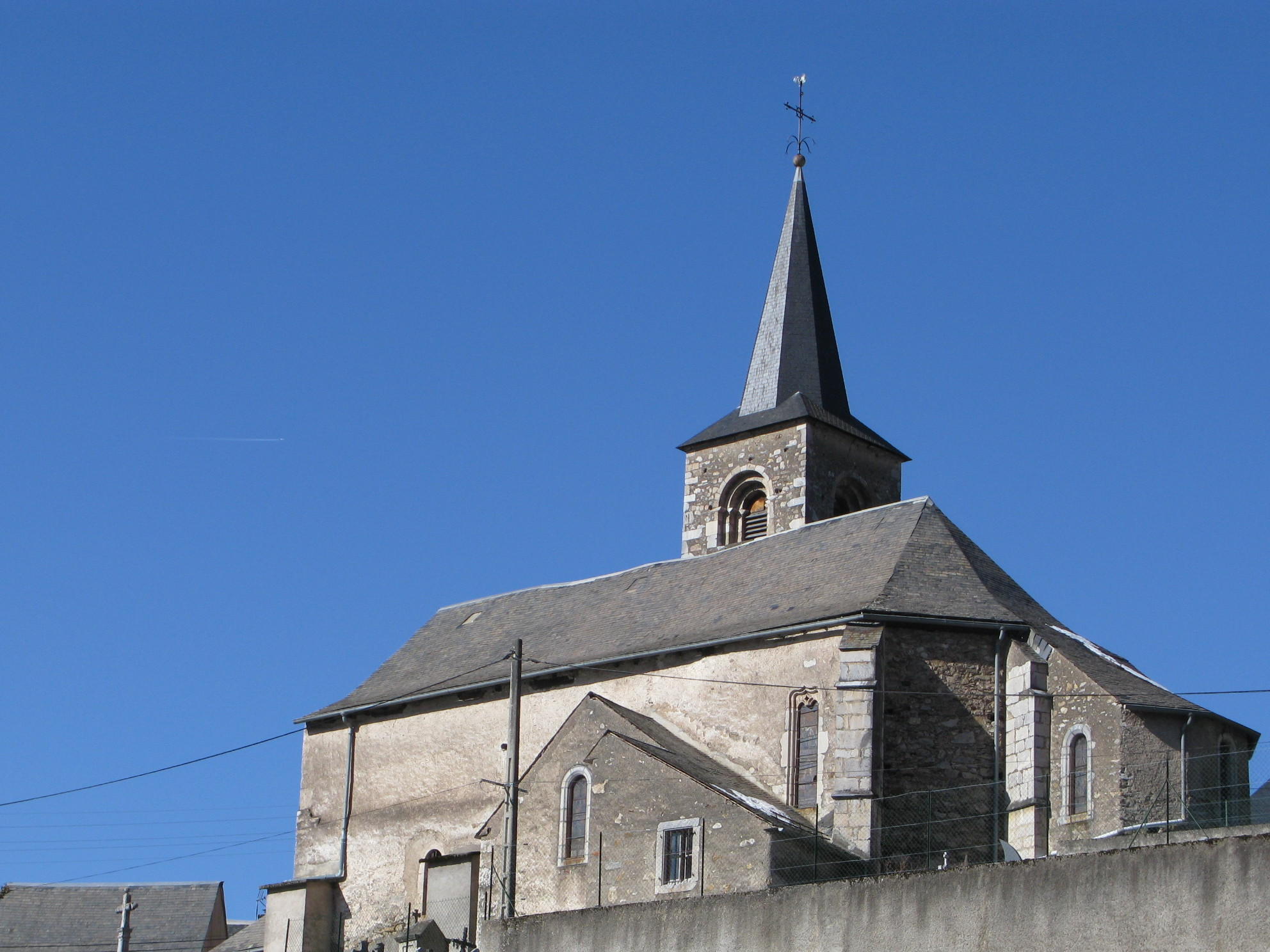 Église d'Ilhet